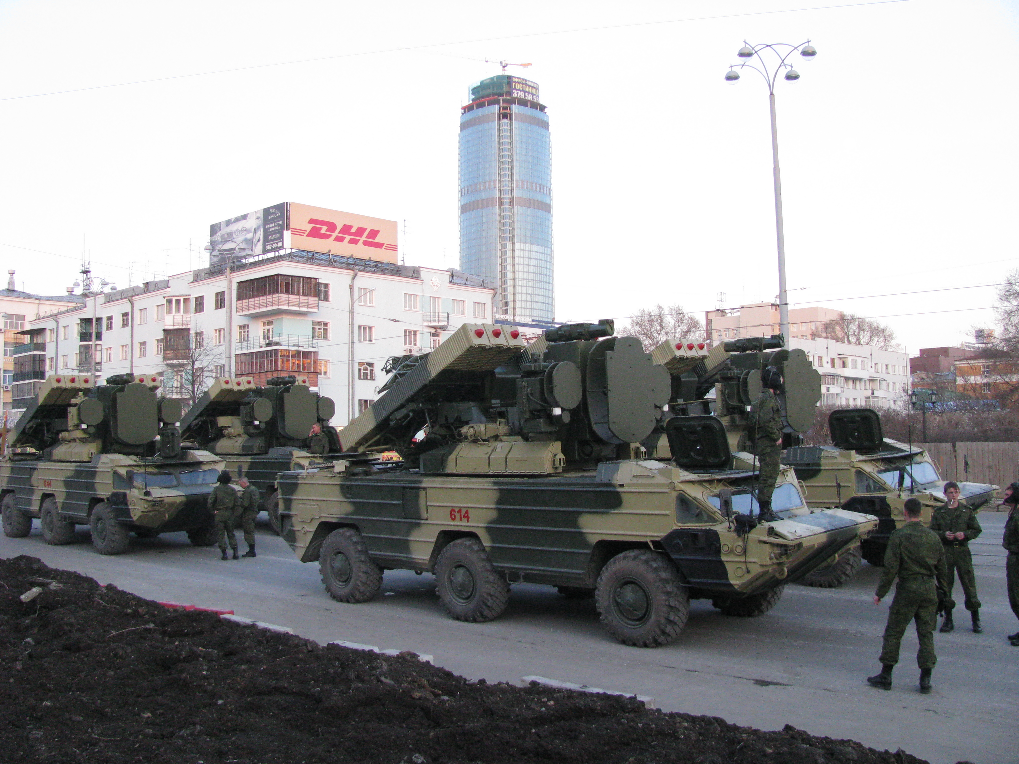 Военная техника на улицах Екатеринбурга перед репетицией парада Победы.